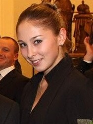 Встреча со спортсменами – победителями чемпионатов мира и Европы 2010 года. Дарья Кондакова